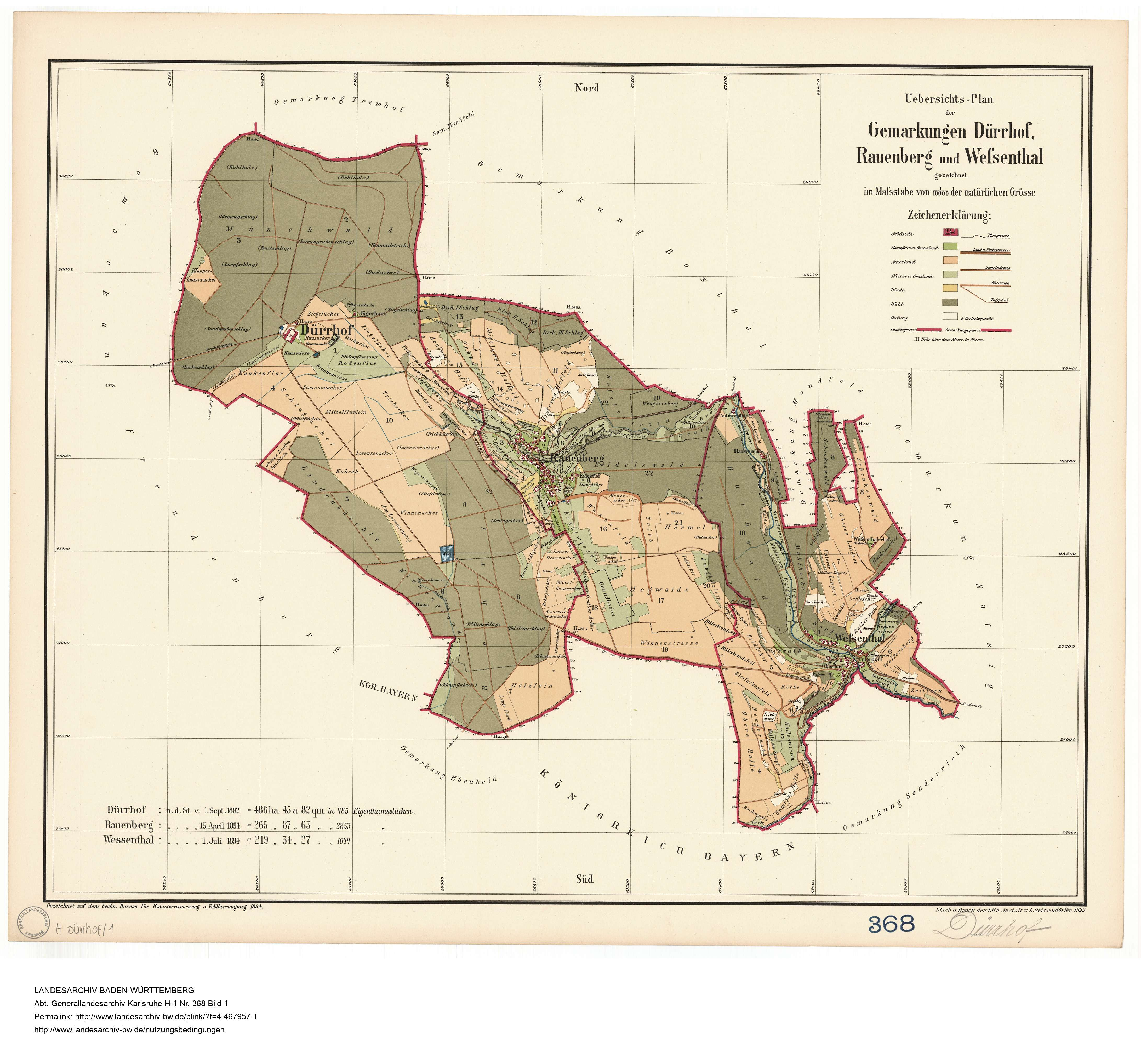 Germarkungspläne von Dürrhof, Rauenberg und Wessental von 1894